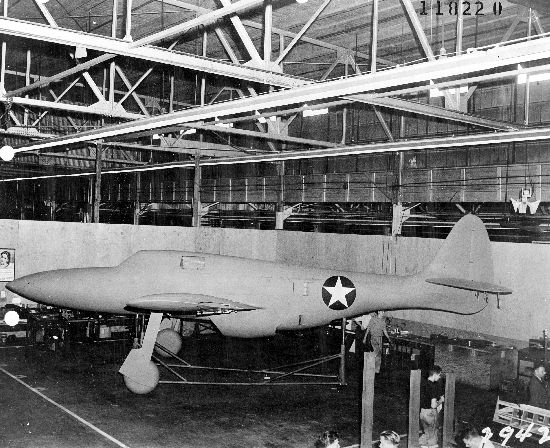 Republic XP-69 3-4 size mock-up